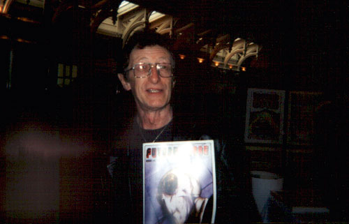 Foto del fumettista Alan Grant